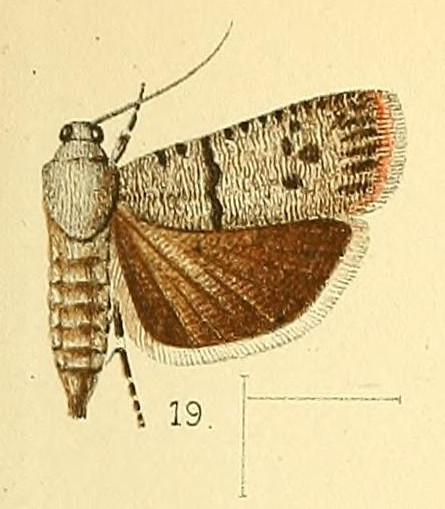 Phycodes substriata